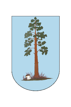 Herb wsi i gminy Osieczna.